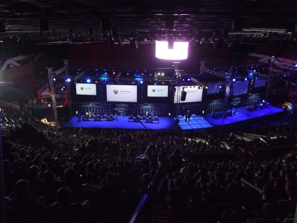 Zdjęcie zrobione podczas Intel Extreme Masters 2013 w katowickim Spodku.